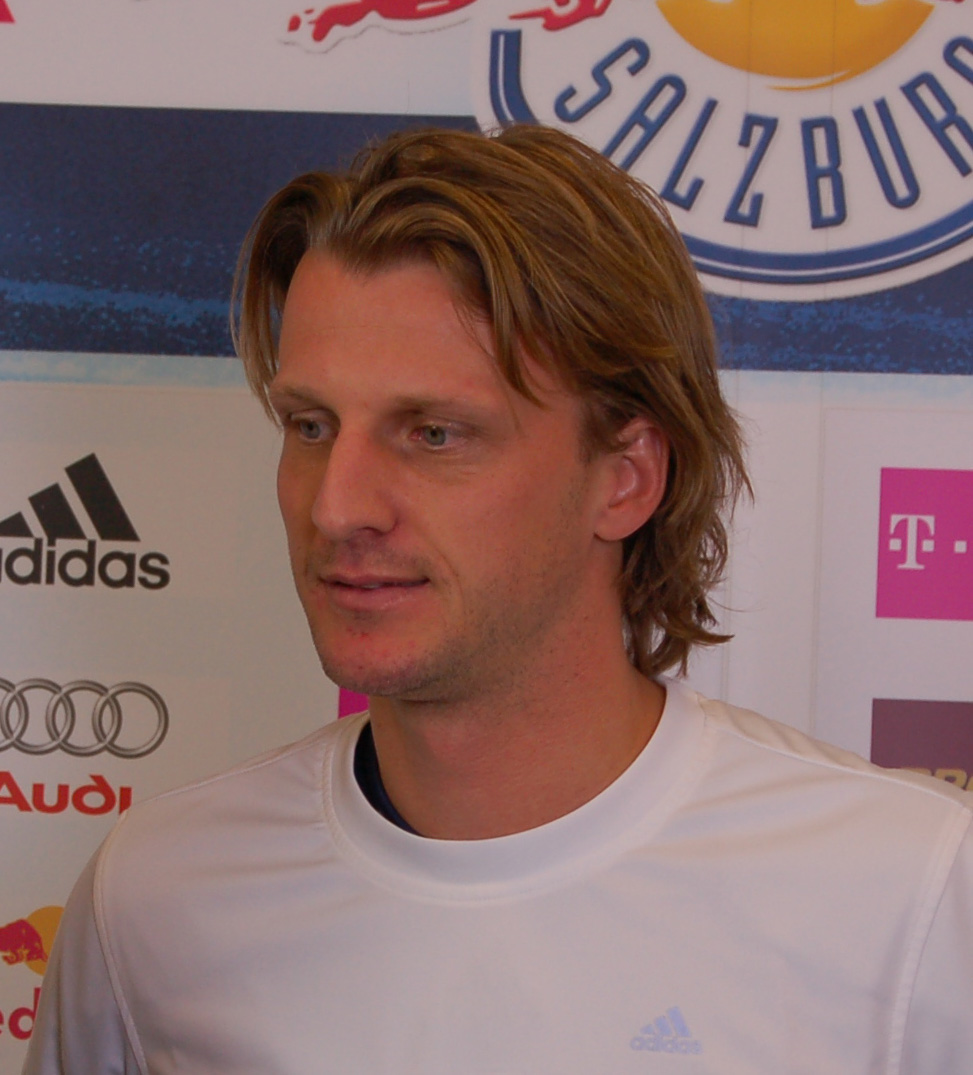 Markus Schopp bei einem Interview im EM-Stadion Wals-Siezenheim